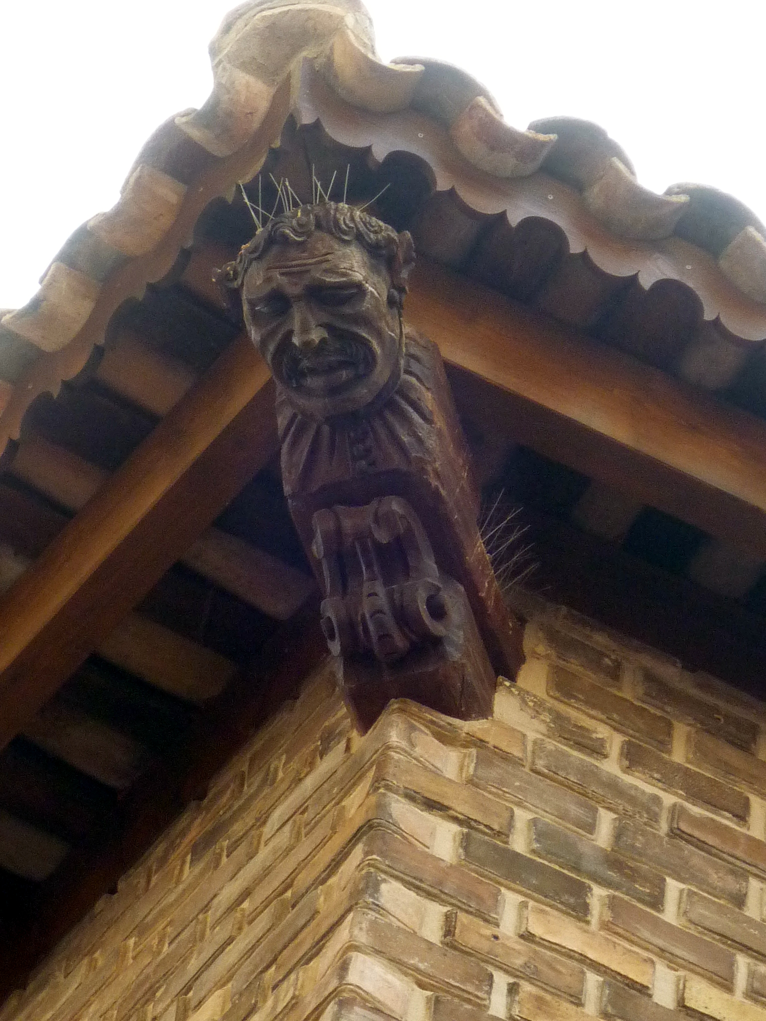 Cal Molins (Solsona): carte·la de fusta que sustenta la cornisa